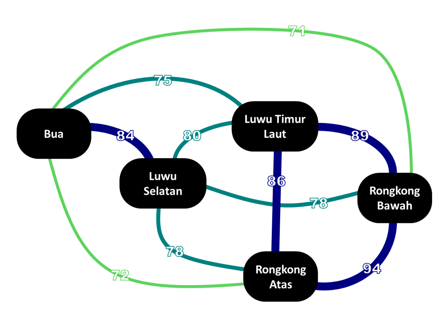 Diagram tingkat persamaan leksikal antara ragam dialek Bahasa Tae' berdasarkan tabel dari Vail (1991).